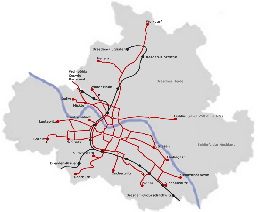 Dresdner Straßenbahnnetz/Streetcar system of Dresden